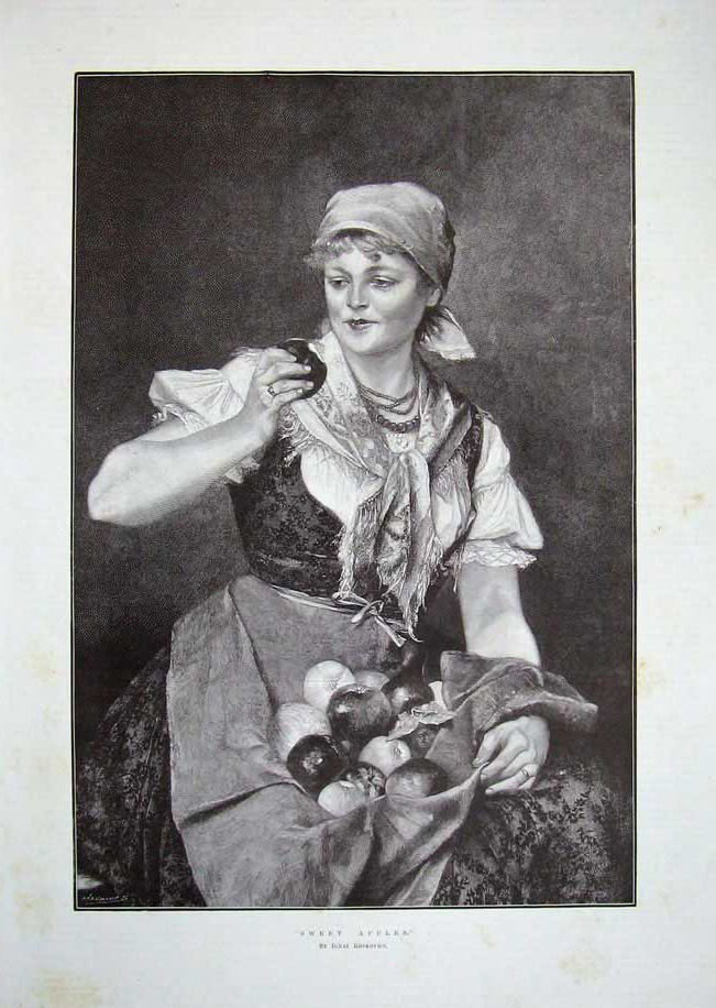 Рошкович - картина "Маленьке червоне яблуко"